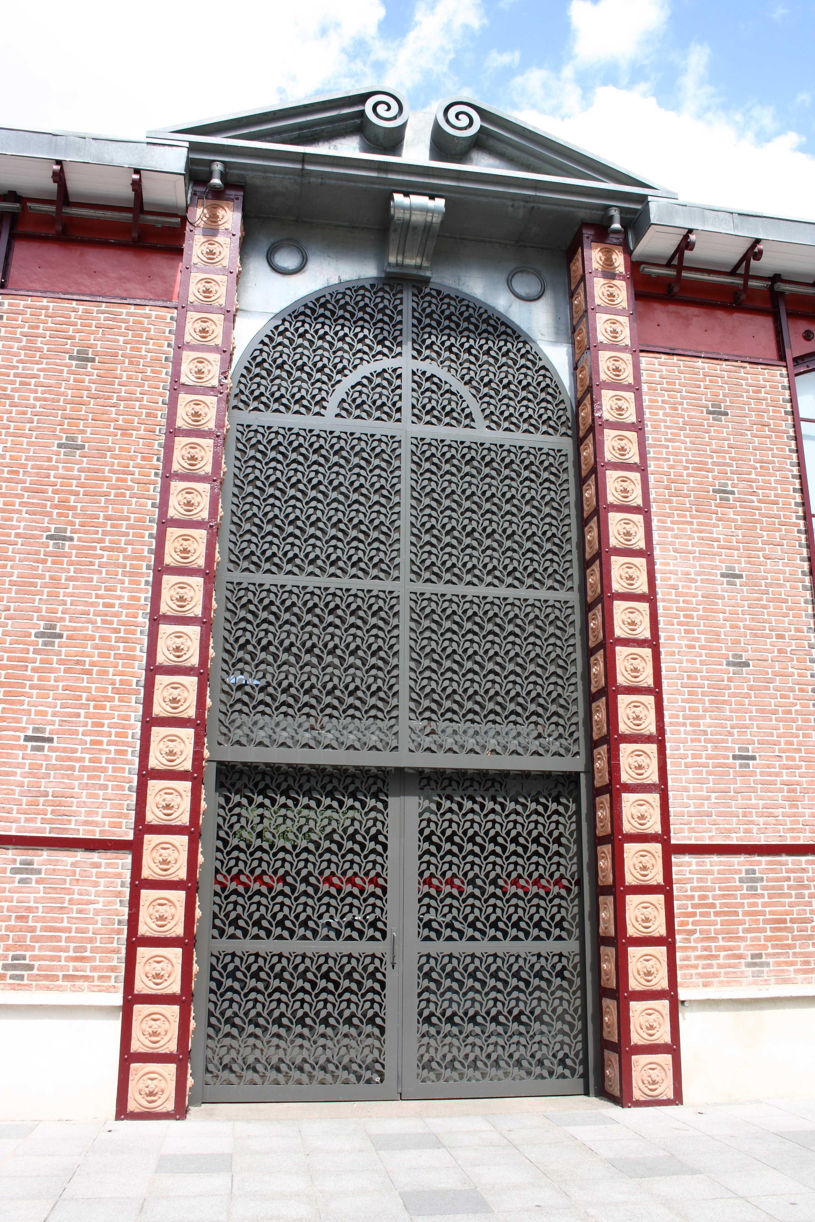 Markthalle in Sceaux im Departement Hauts-de-Seine bei Paris, 64 avenue du Président Franklin Roosevelt